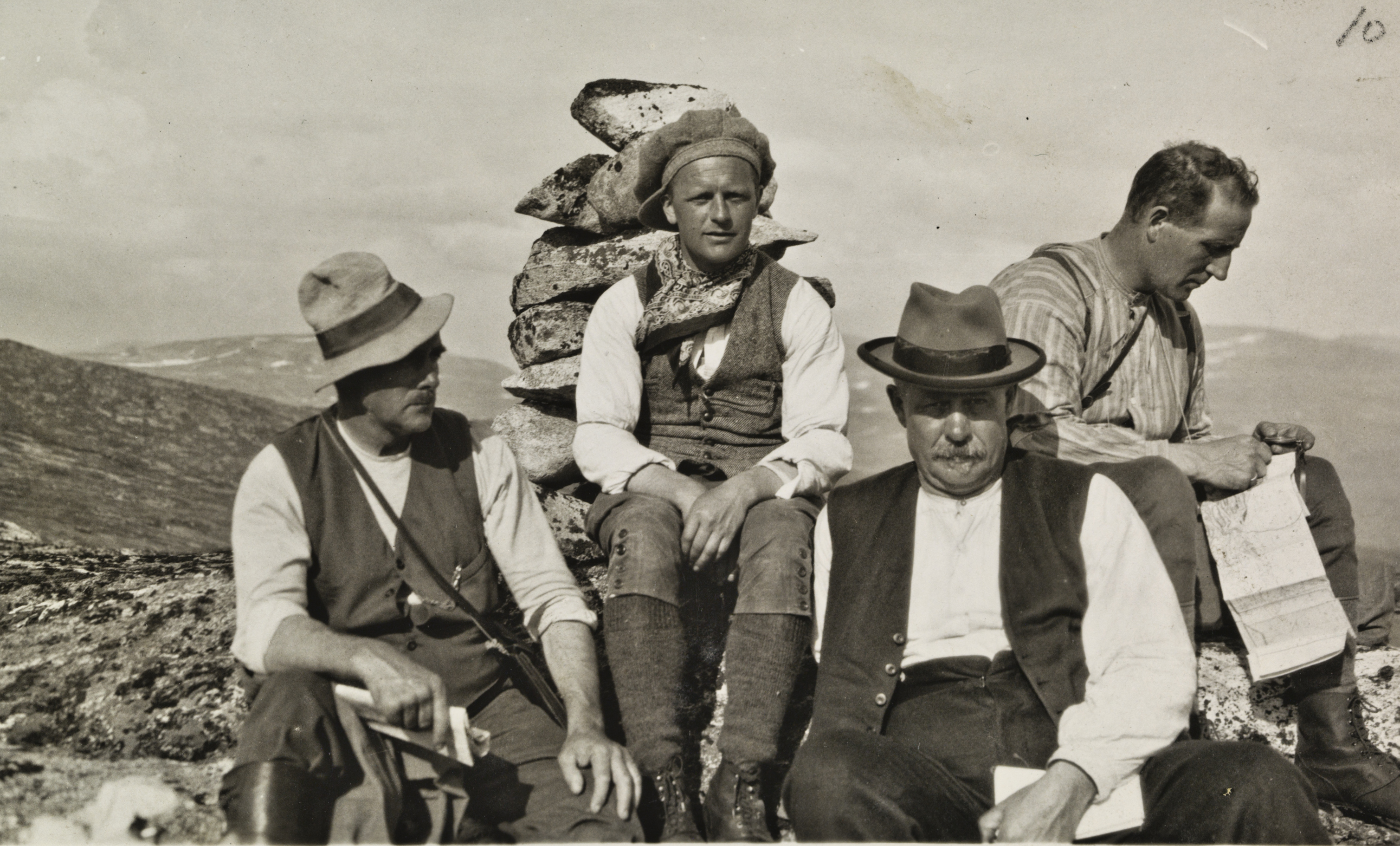 Bildet er hentet fra Arkivverket. Medlemmer av Høyfjellskommisjonen avbildet på en av sine befaringer. Arkivinstitusjon : Riksarkivet Arkivnavn : Høyfjellskommisjonen Sted : Norge, Møre og Romsdal, , Emneord: allmenningsgrunn, fjell, høyfjell, høyfjellsgrunn, særdomstol, fjellandskap Avbildet